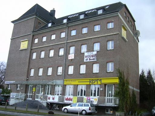 eigenes Foto vom 09.02.06